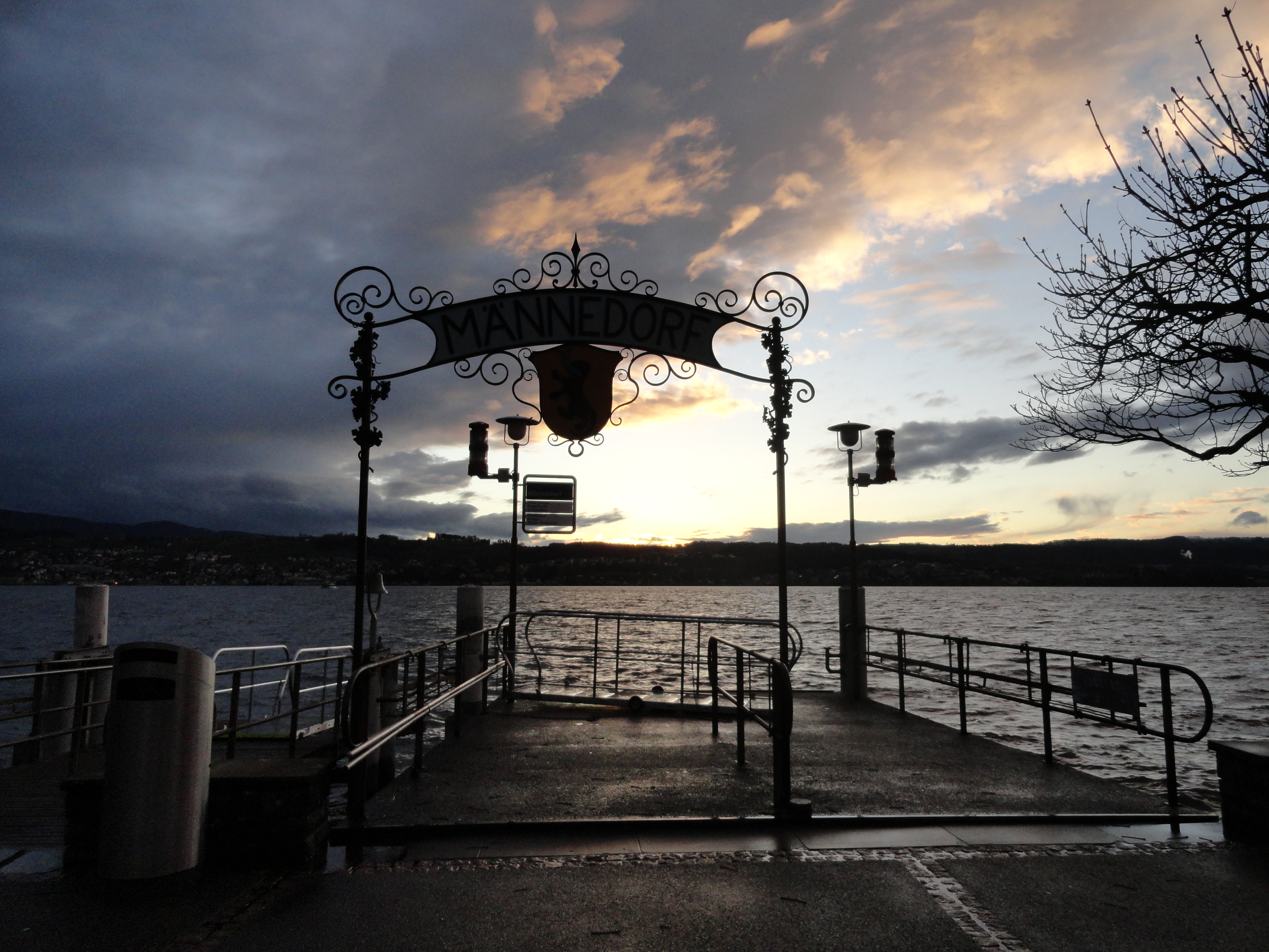 Sonnenuntergang bei Sturm in Männedorf